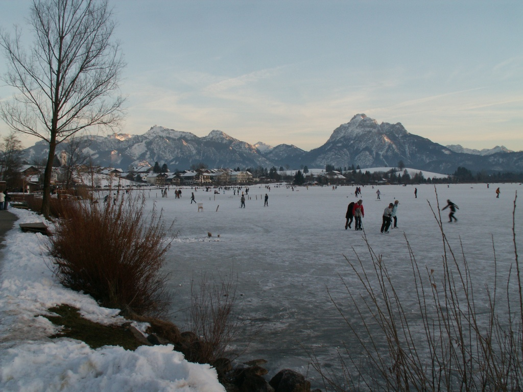 Frozen Hopfensee